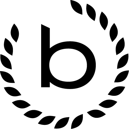 Dies ist das bugatti Icon der Mode-Marke bugatti